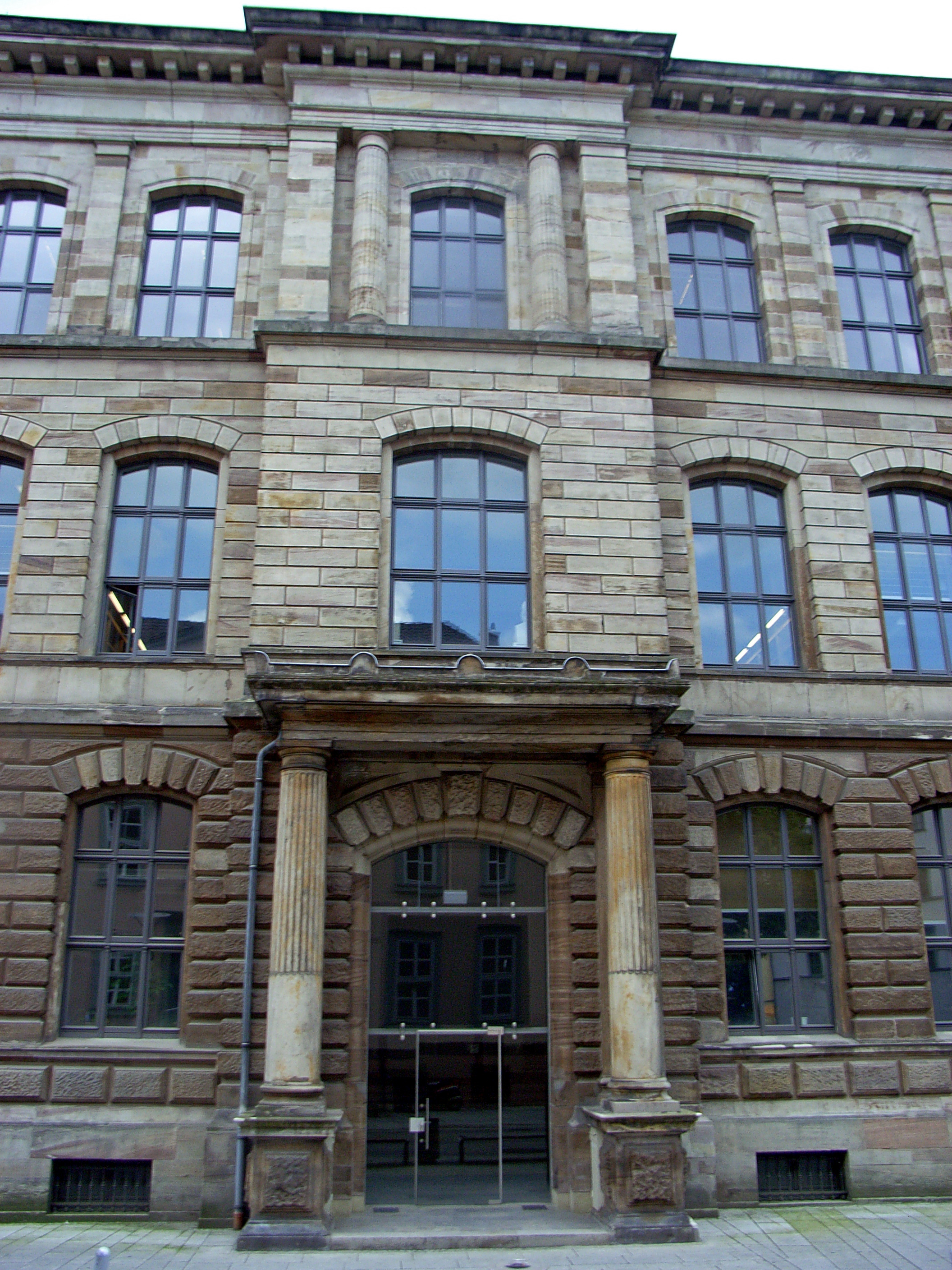 Dieses Bild zeigt einen Eingang der Universitätsbibliothek von Göttingen.